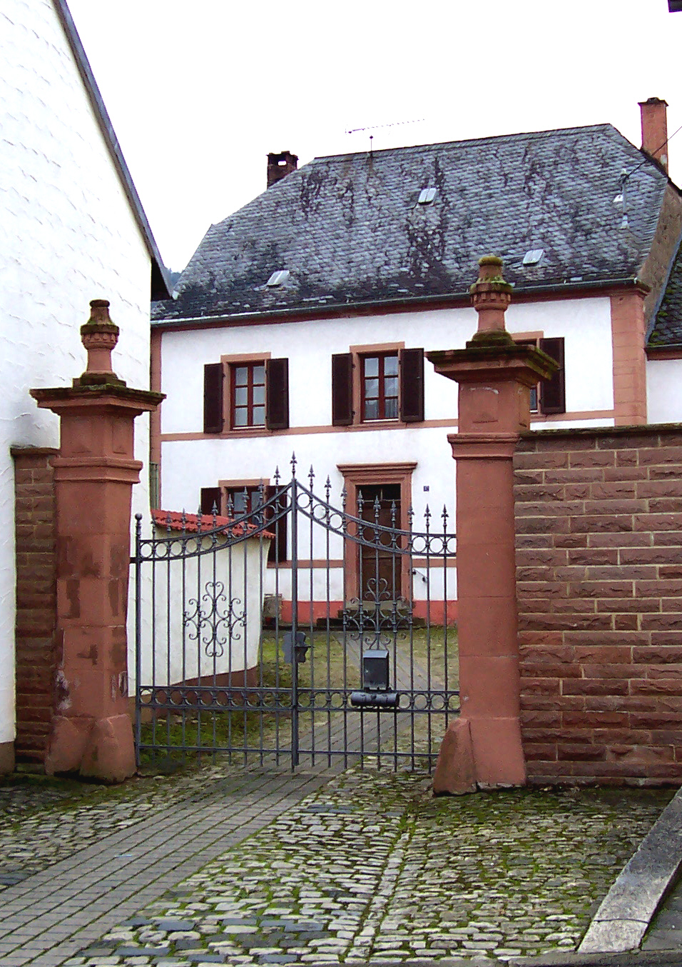 Altes Bauernhaus in Wasserliesch